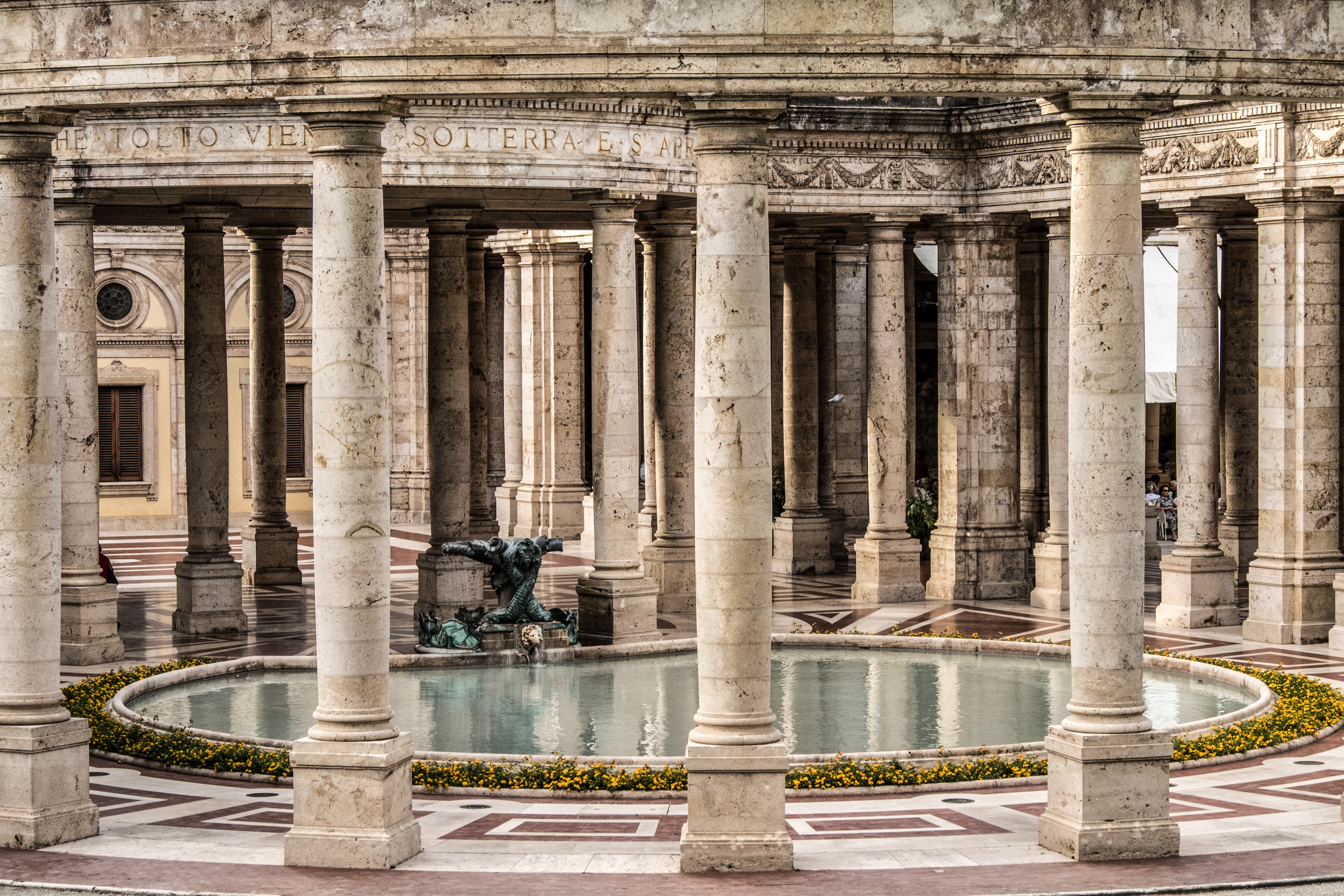 Terme Tettuccio a Montecatini Terme, terzo premio WML Toscana 2018 2018(PT)